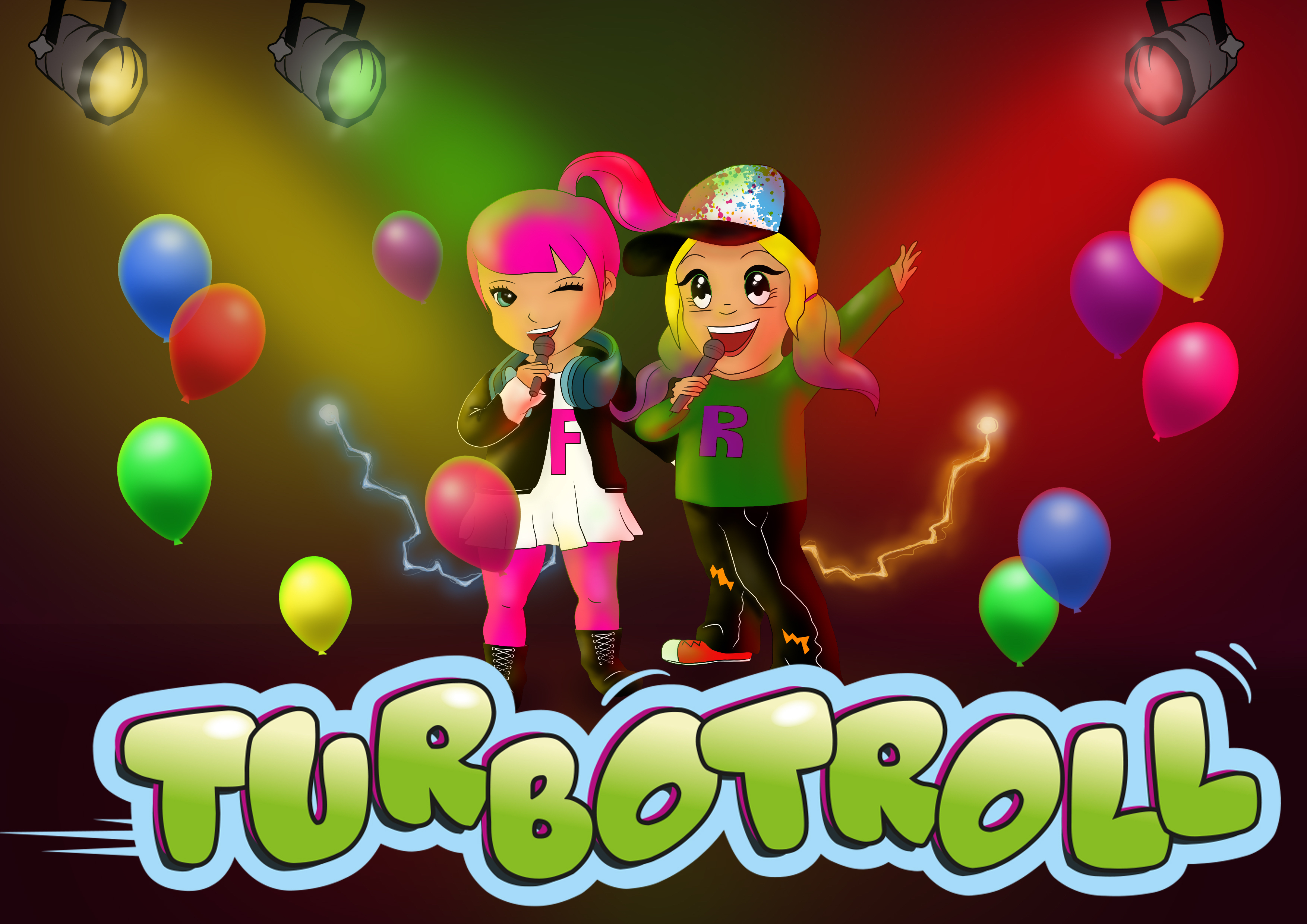 Illustrasjon: Cecilie Sveberg